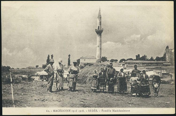 Седес през Първата световна война